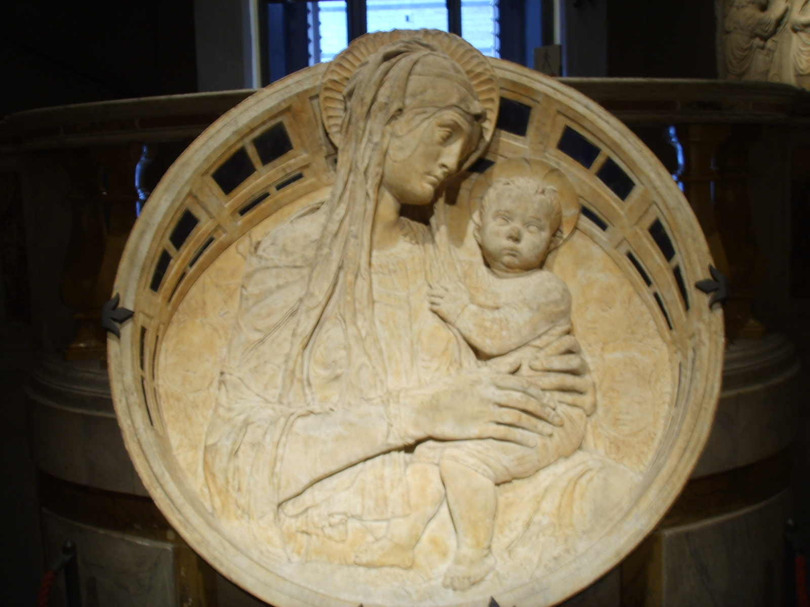 Sculpture by Donatello, Opera del Duomo Museum in Siena, Italy